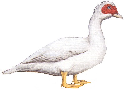 Pato Criollo blanco.